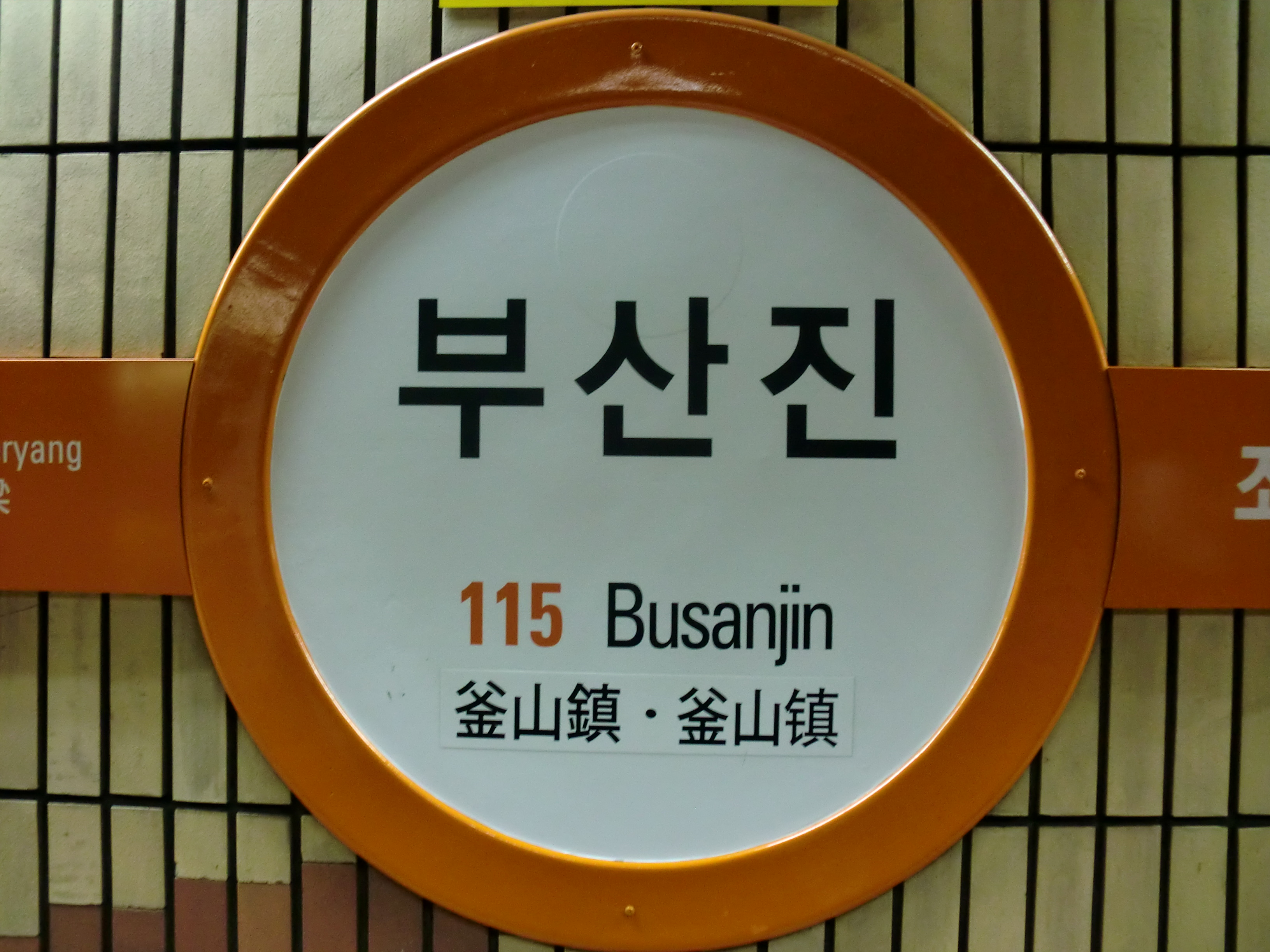 부산도시철도1호선 부산진역의 역명판